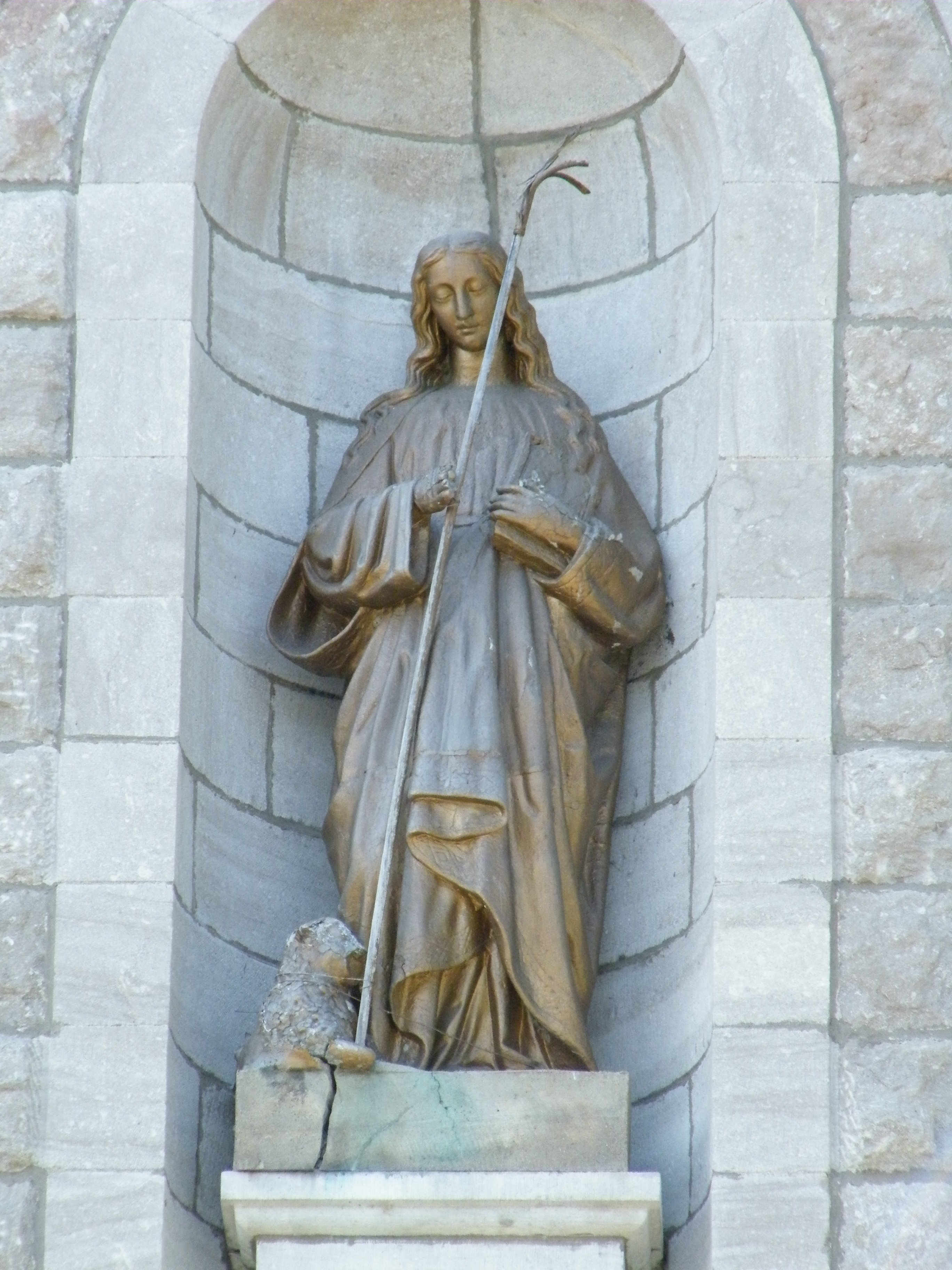 Statue de sainte Geneviève en façade de l'église Sainte-Geneviève, à Sainte-Geneviève-de-Batiscan, dans la MRC des Chenaux, région de la Mauricie, au Québec